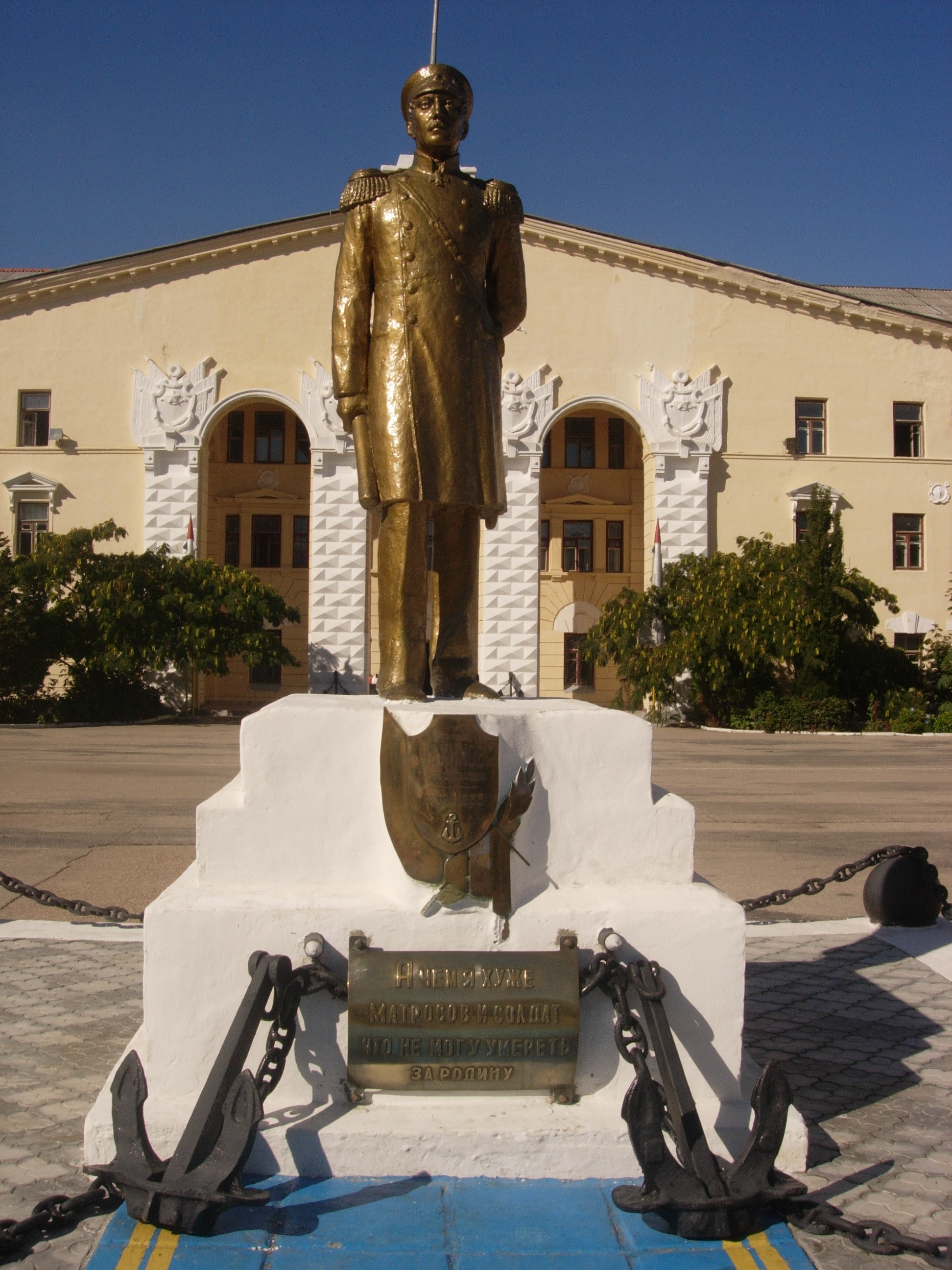 Пам'ятник вихованцям Чорноморського вищого воєнно-морського училища ім. Нахімова, загиблим у Великій Вітчизняній війні Радянського Союзу 1941–1945, Севастополь, вул. П. Дибенка